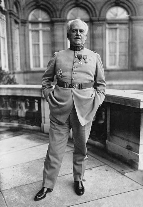 Entrevue Herriot-Chamberlain au ministère des Affaires étrangères : le général Nollet, ministre de la Guerre (photographie de presse)